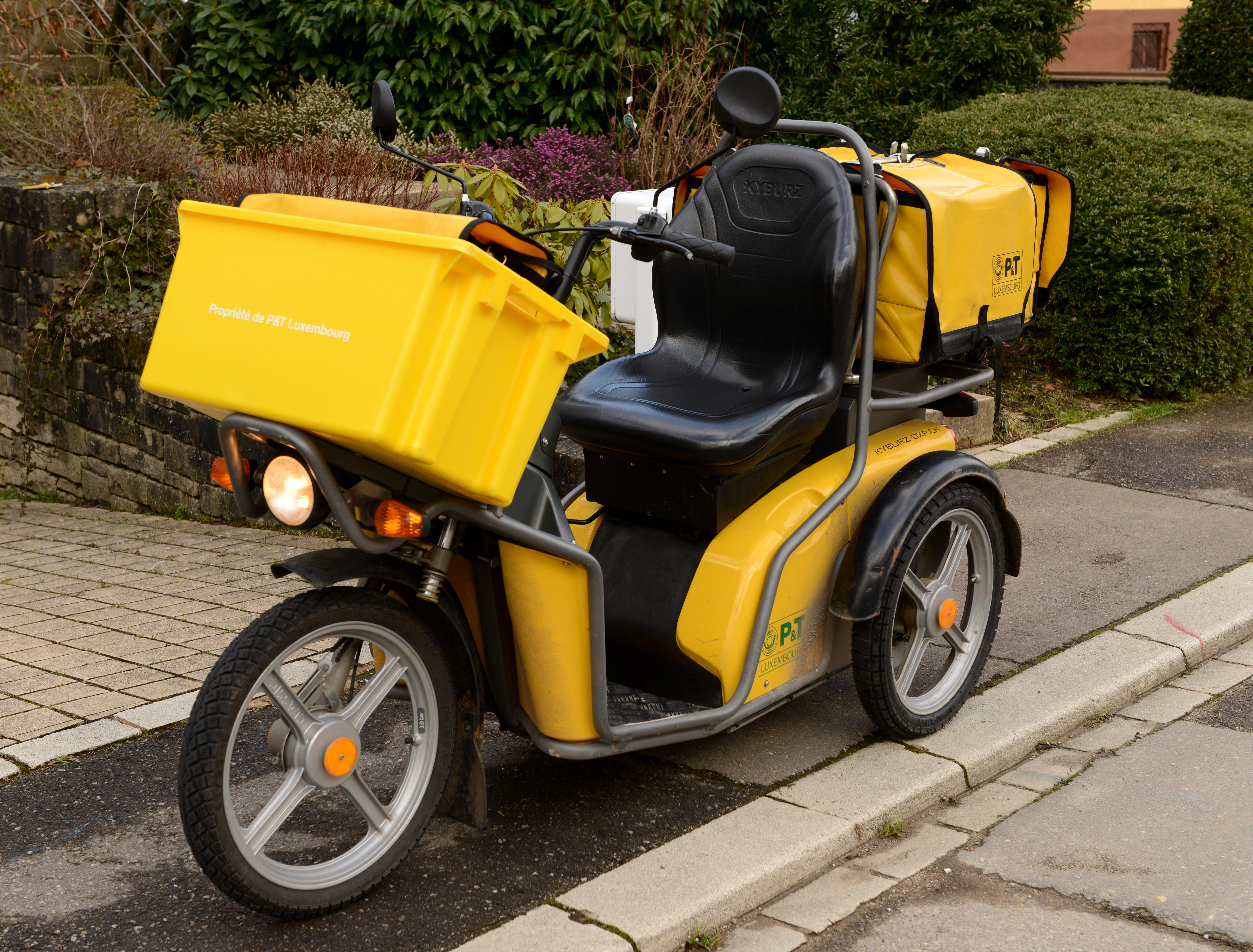 De Facteur op Rieder - e "Kyburz-DXP" vun der Lëtzebuerger Post.